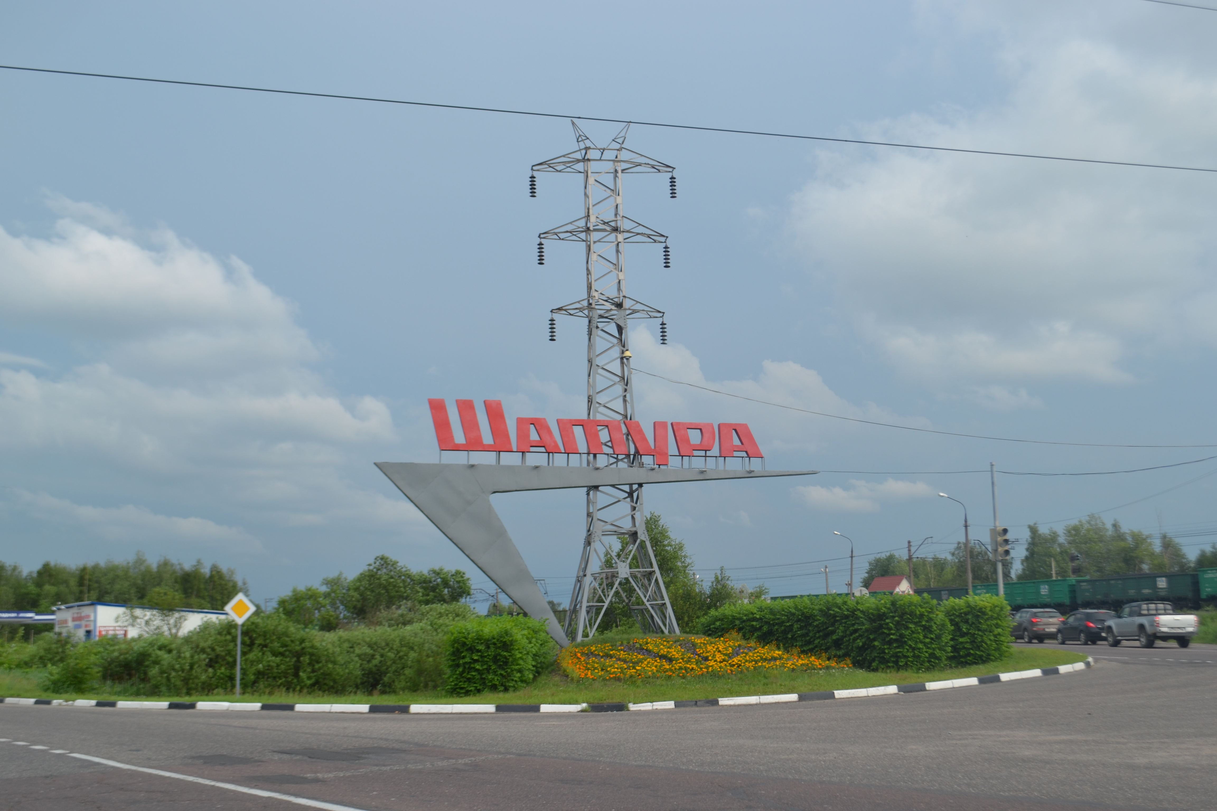 Знак при въезде в Шатуру